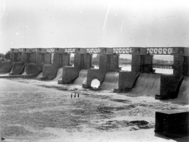 Presa - Castronuño (Valladolid) - Cuaderno. Álbum de Valladolid - Fotografía 60 x 42 B/N